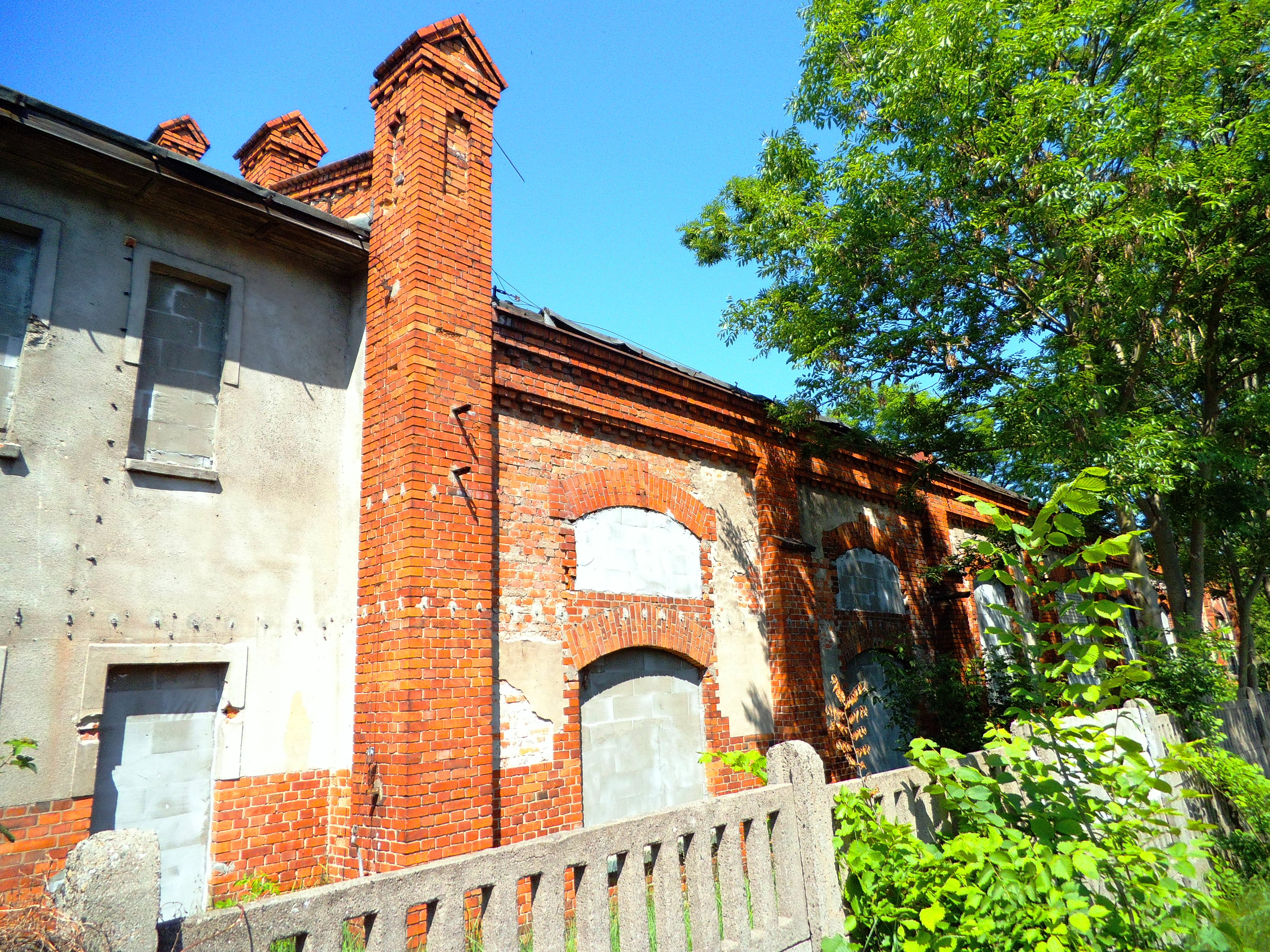 Dawna ujeżdżalnia koni w Toruniu2